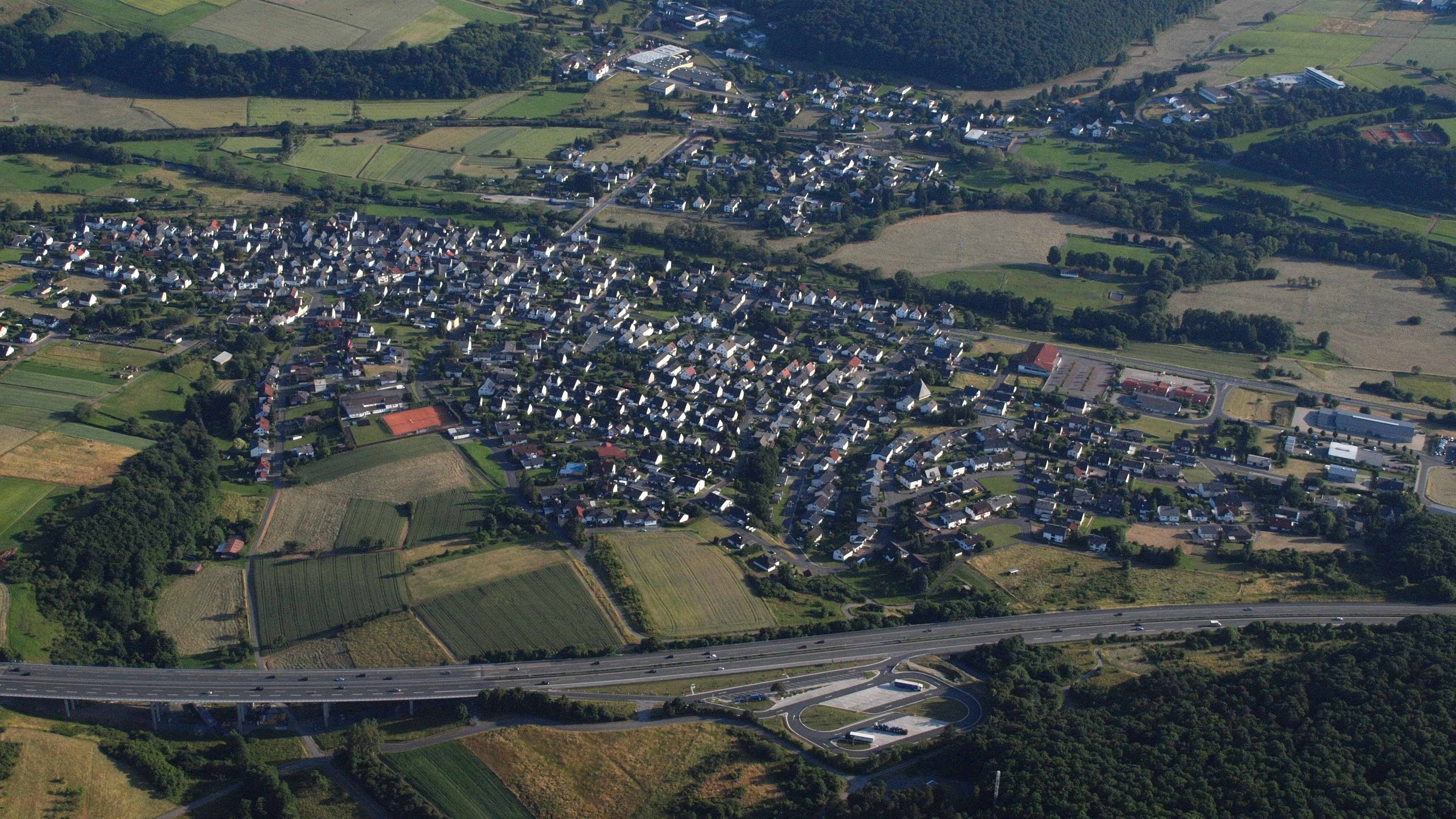 Katzenfurt, Gemeinde Ehringshausen: Luftaufnahme